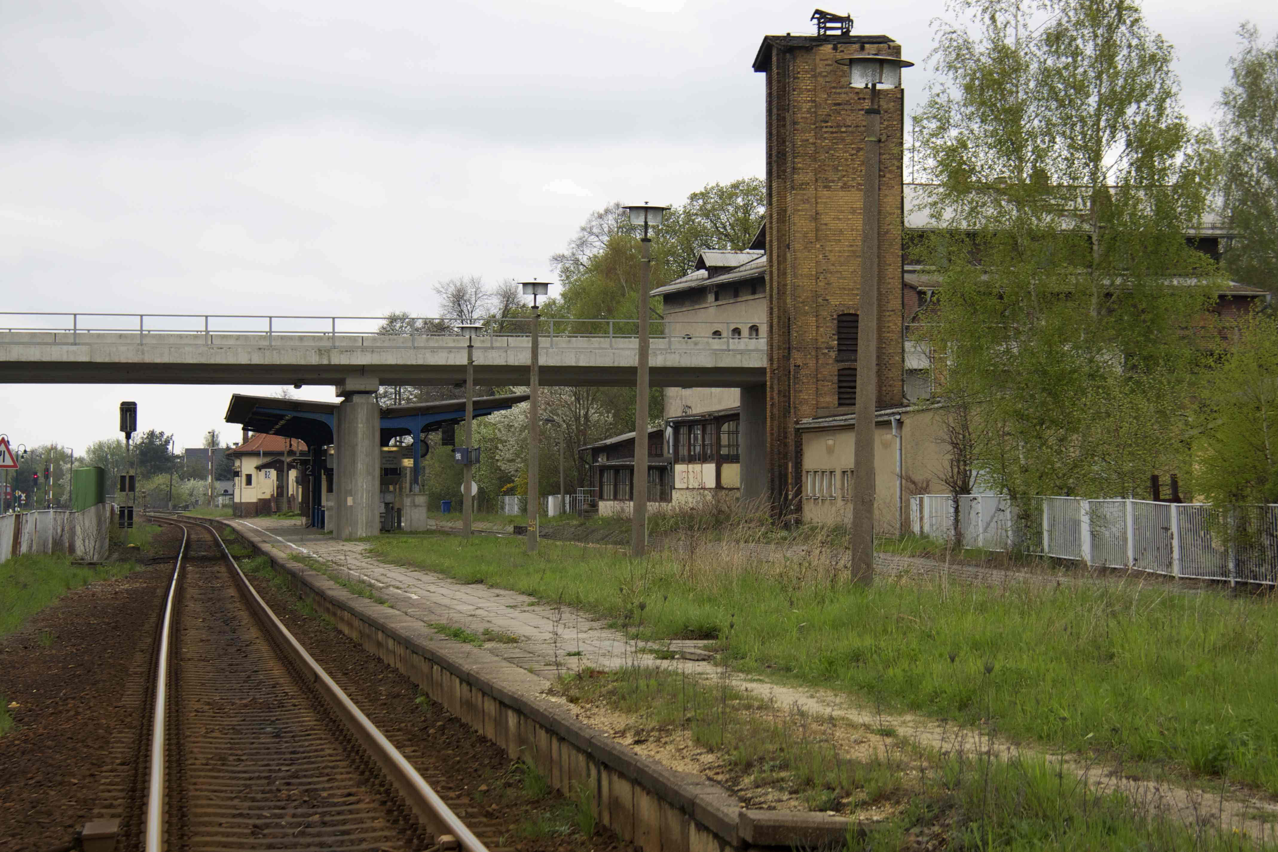 Personenbahnhof Horka